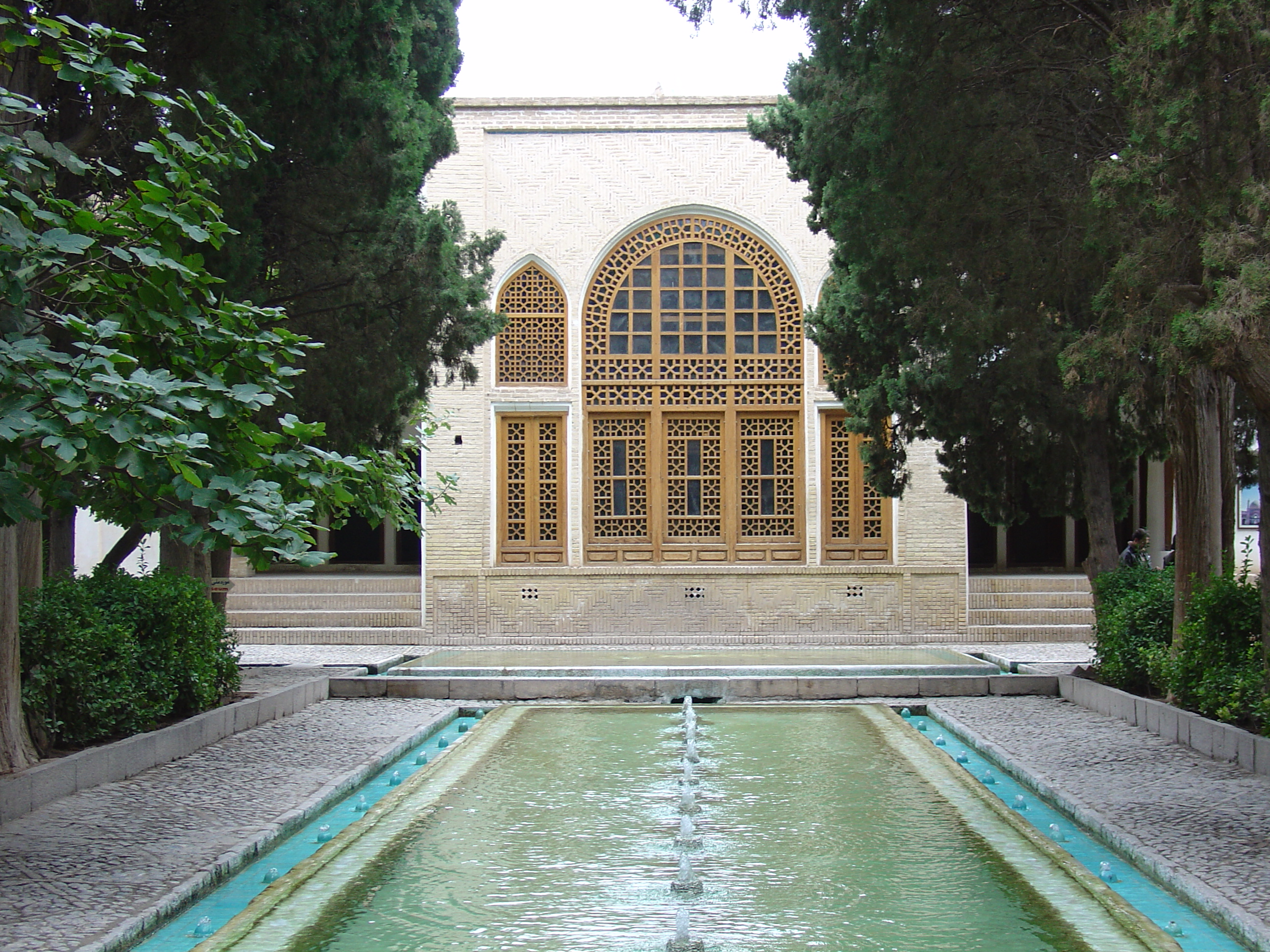 Bagh-e Fin, Kashan, Iran.